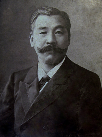 初代東京帝国大学医科大学薬物学 高橋順太郎教授 35歳頃